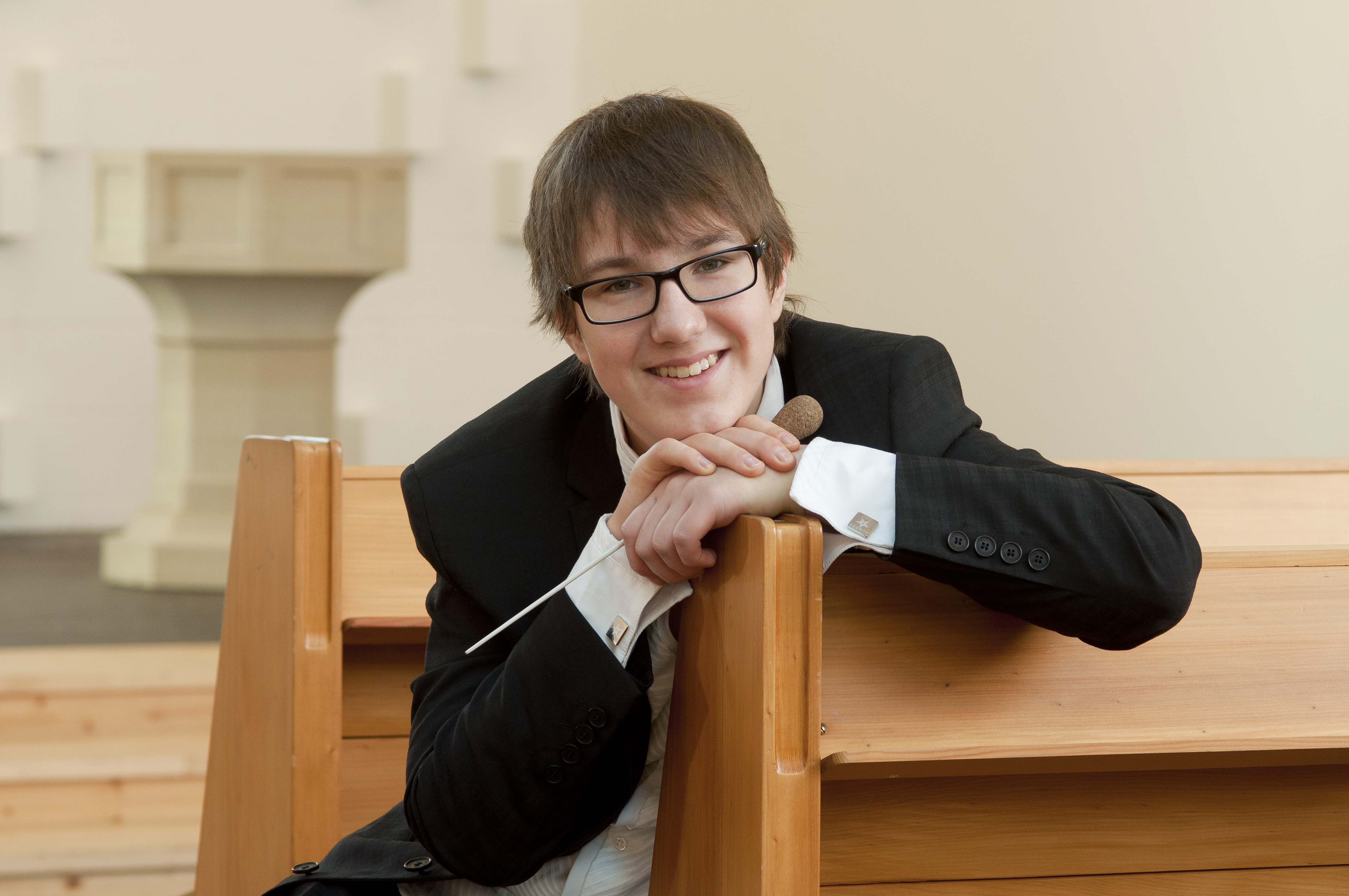 Heldur Harry Põlda